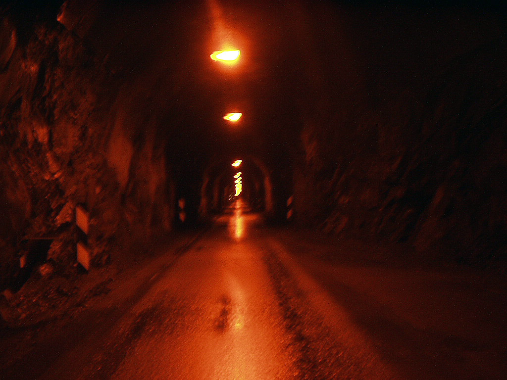 Inne i Øksfjordtunnelen